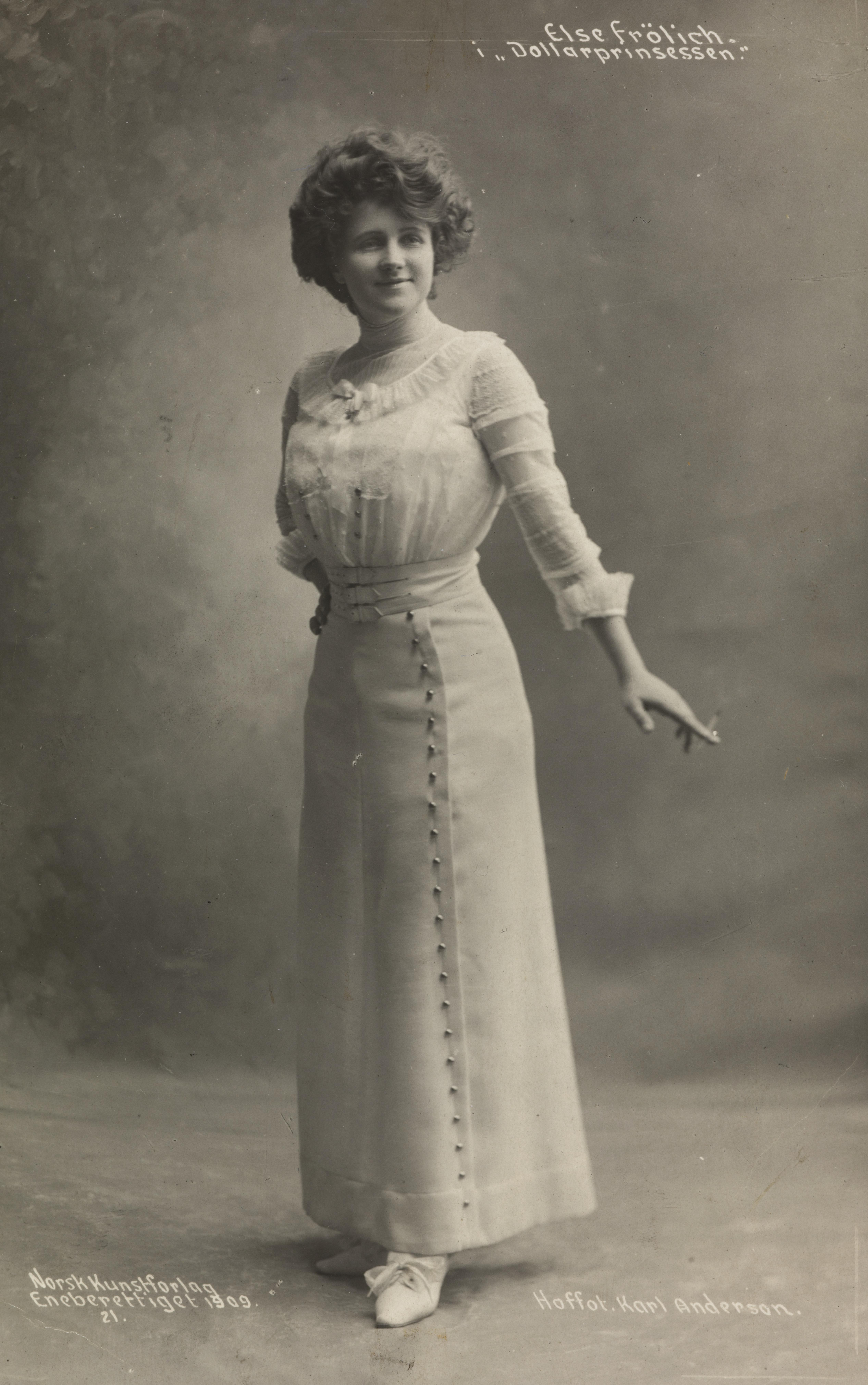 Bildet er hentet fra Nasjonalbibliotekets bildesamling Depicted person: Frølich, Else